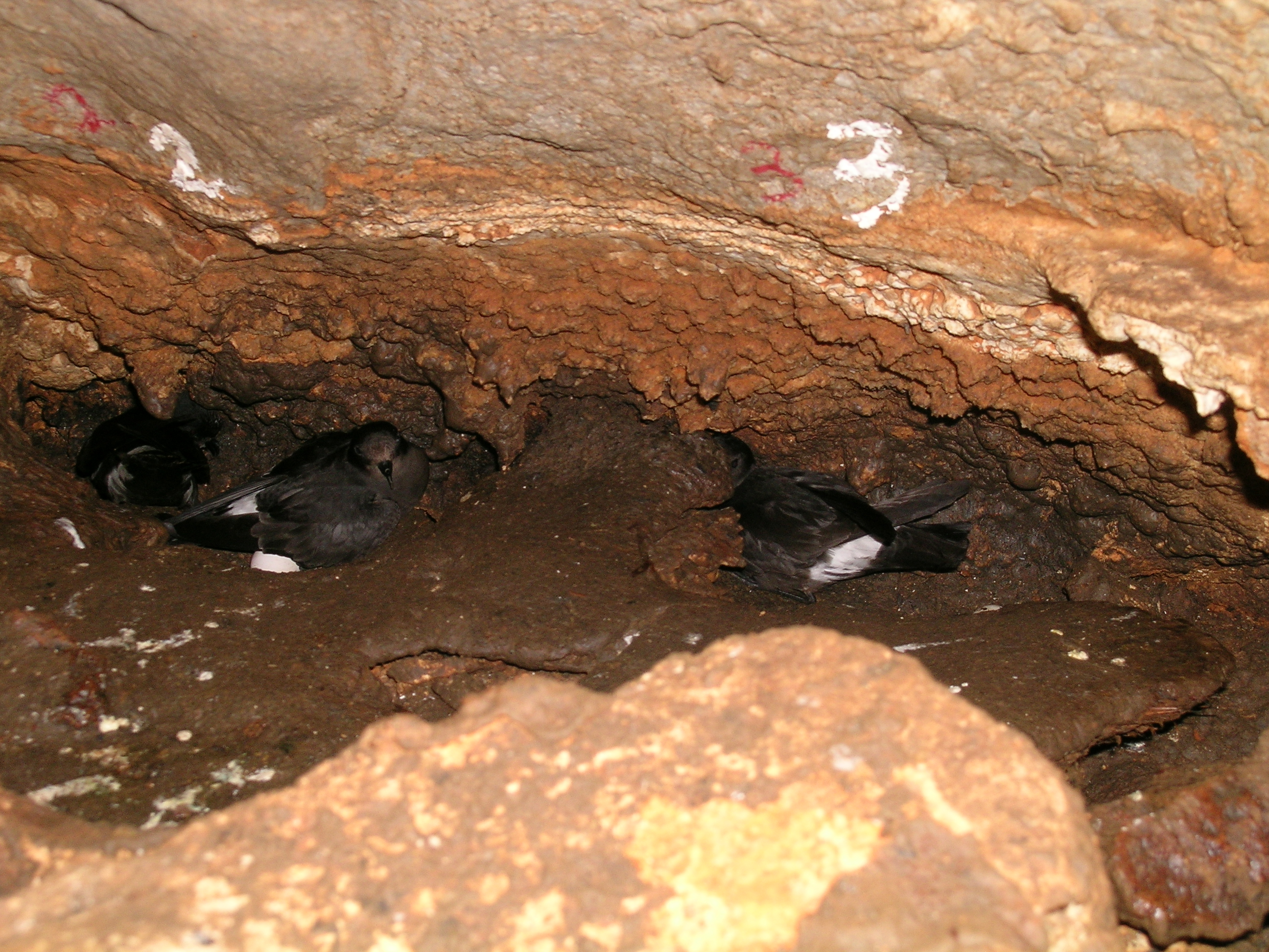 Biologia. Matxiplaken populazioaren kontrola Matxiplaken Koban (Ogoño, Bizkaia).